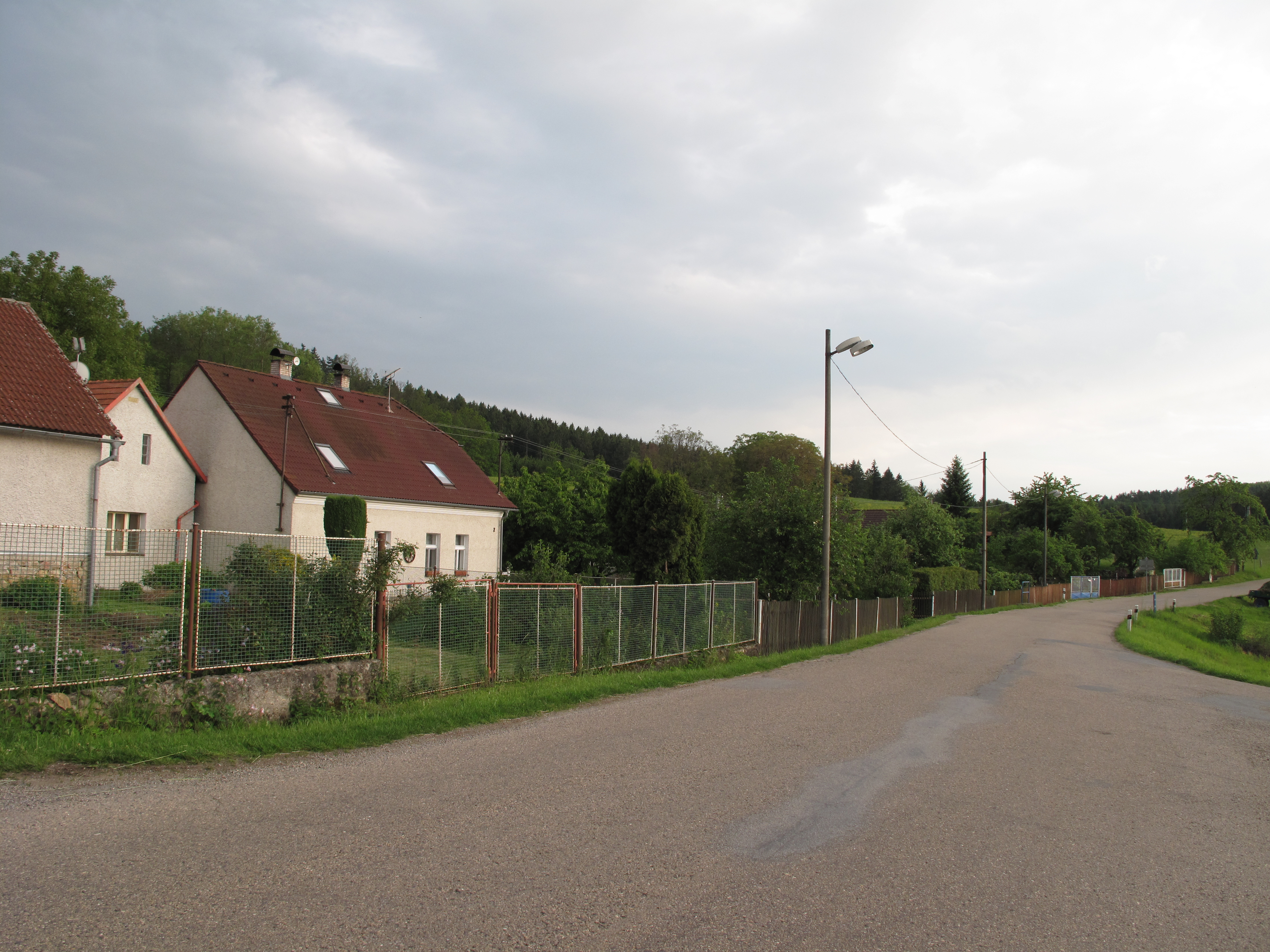 Domy u cesty v Líštěnci.